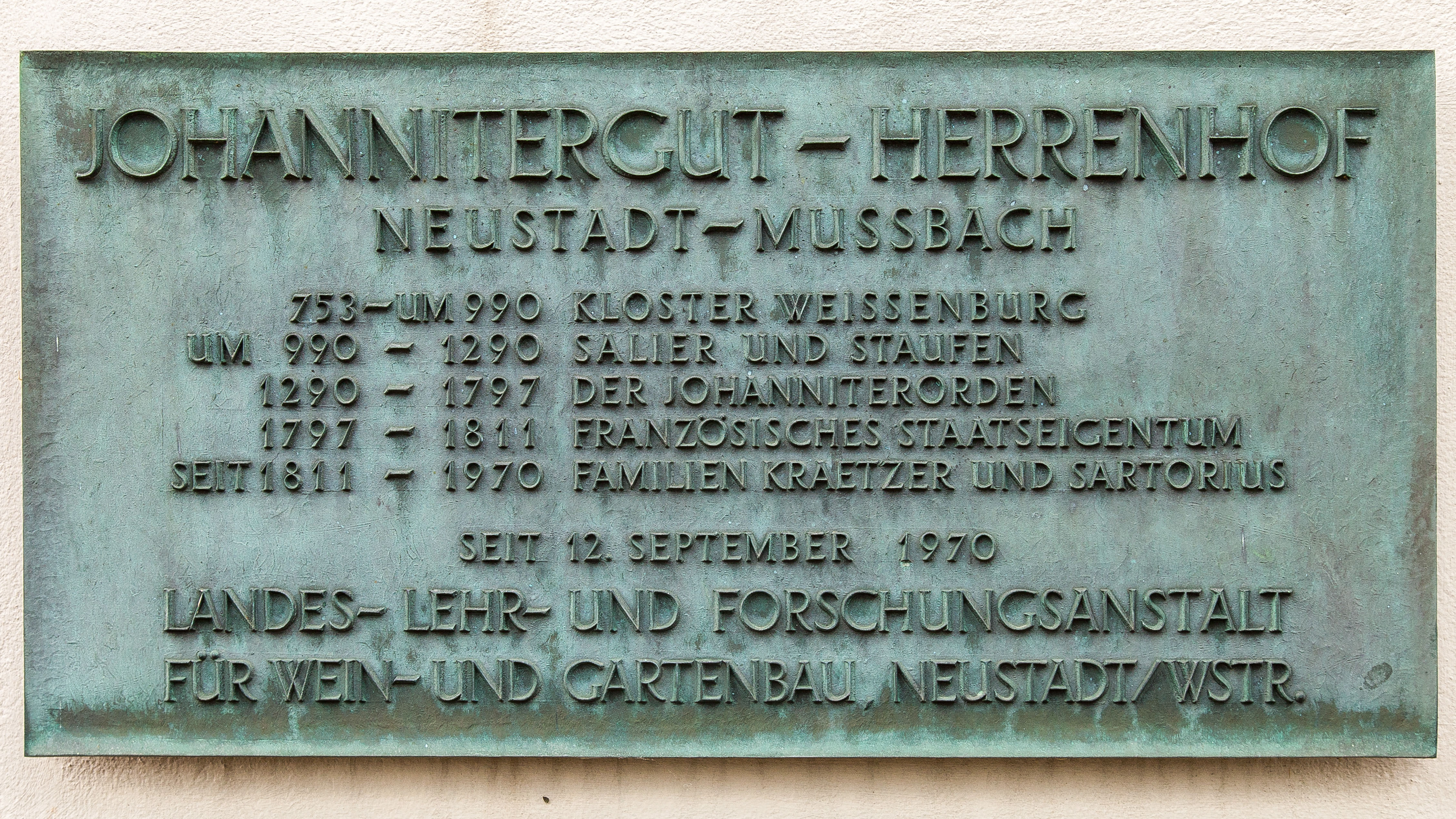 Informationstafel zur Geschichte des Johannitergutes in Mussbach